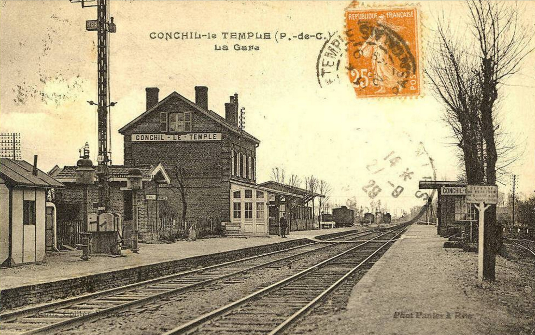 Gare fermée de Conchil-le-Temple, Pas-de-Calais, Nord-Pas-de-Calais, France.